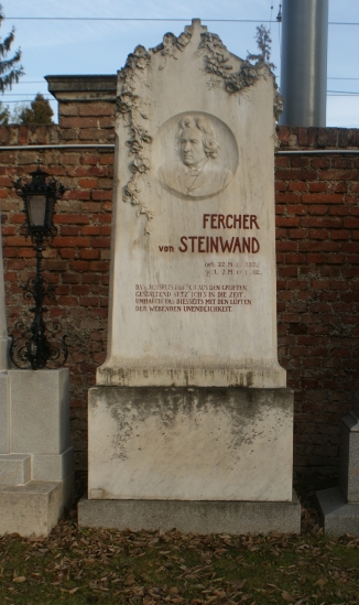 Wiener Zentralfriedhof-Johann Fercher von Steinwand